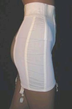 photo perso